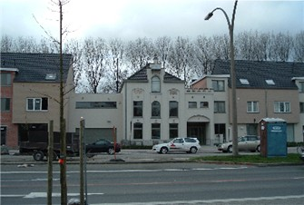 Voormalige drukkerij Witteryck langs de Baron Ruzettelaan te Steenbrugge; toestand in 2004.